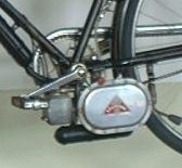 Fahrrad mit Lohman Anbaumotor, Motorradmuseum Ibbenbüren